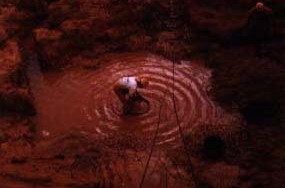 Chercheur de diamant au Brésil (Mato Grosso)